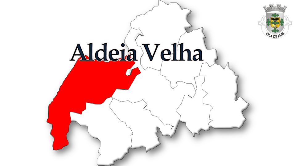 Evolução da População